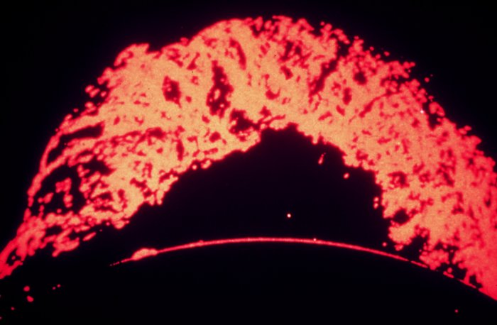 zonnestorm